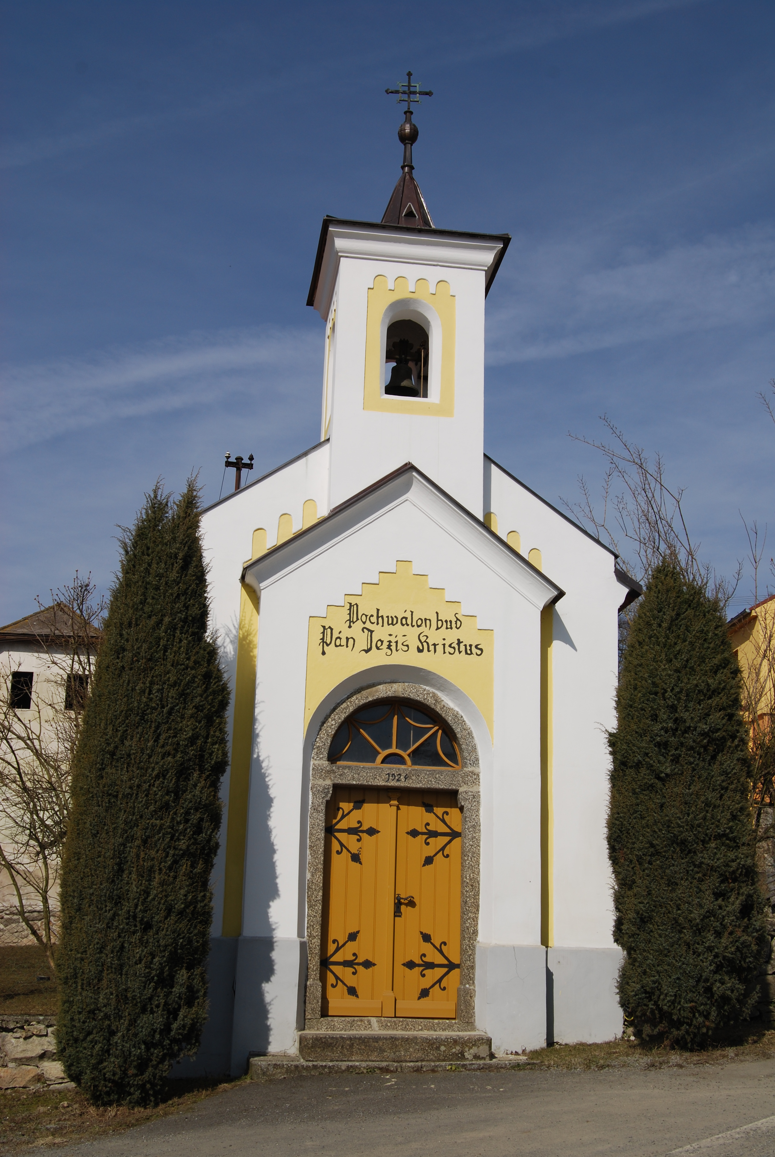 Kaple zasvěcená Nejsvětějšímu Srdci Páně z roku 1924 obci. Dobřemilice je část obce Vlksice v okrese Písek. Česká republika.